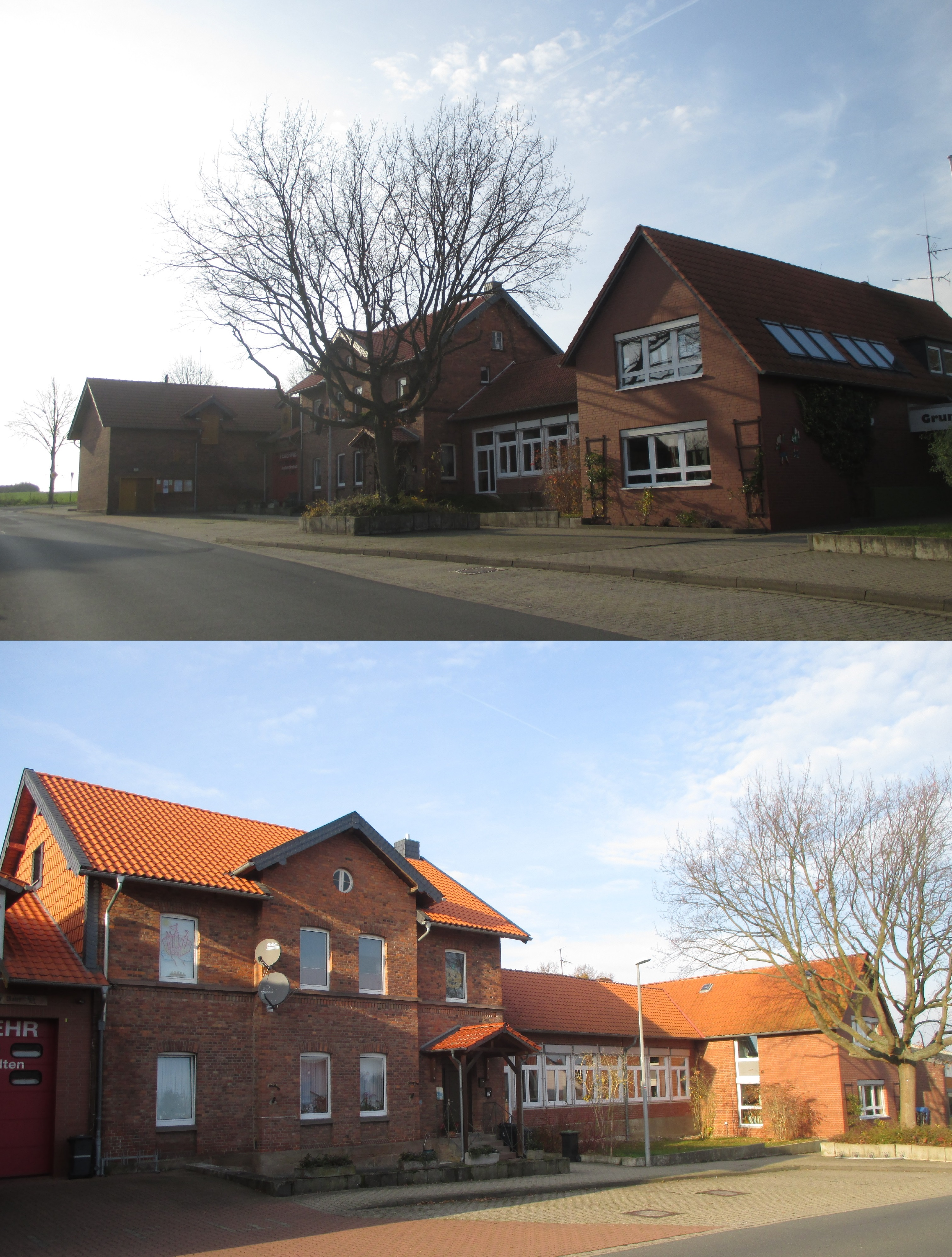 Grundschule Hohenassel in der Gemeinde Burgdorf, Landkreis Wolfenbüttel